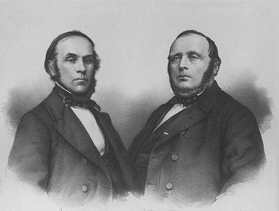 Nicolai Ahlmann (1809-1890), Hans Andersen Krüger (1816-1881)